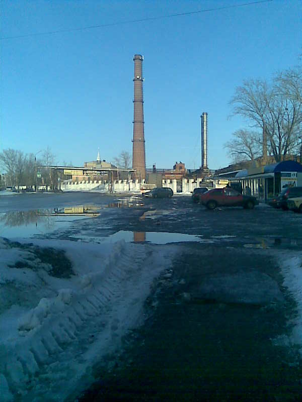 Узловский машиностроительный завод(?)